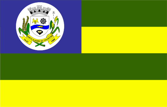 Bandeira Porto Alegre Do Tocantins